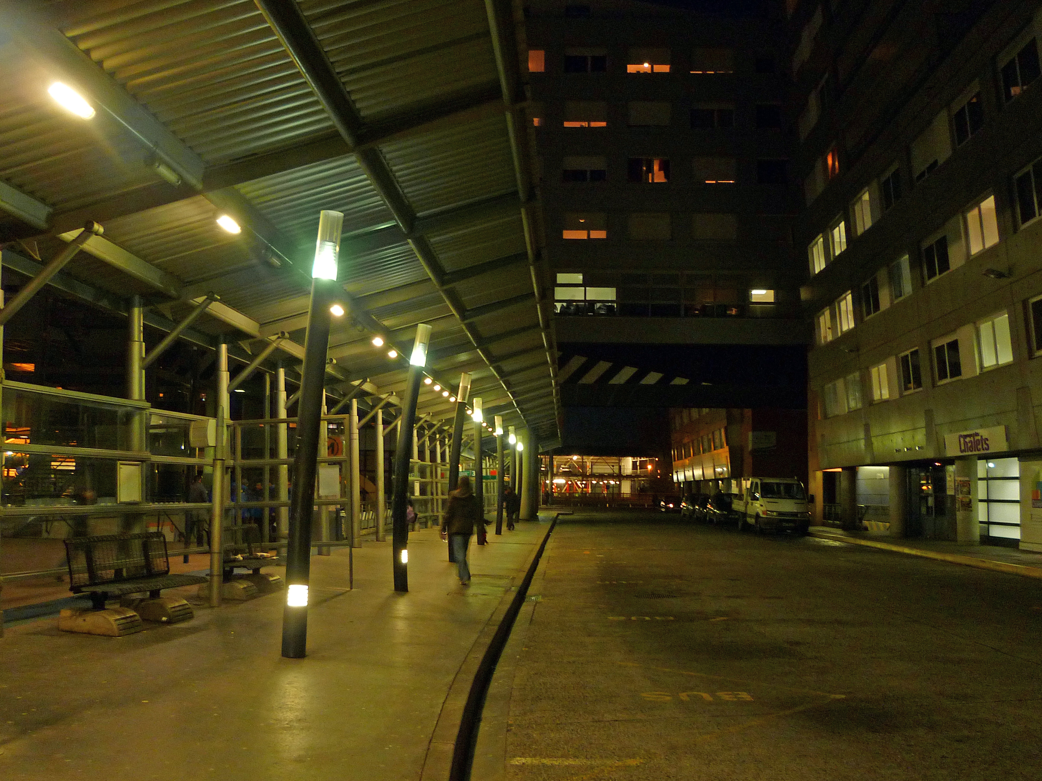 Gare routière des Arènes à Toulouse (Haute-Garonne, France).